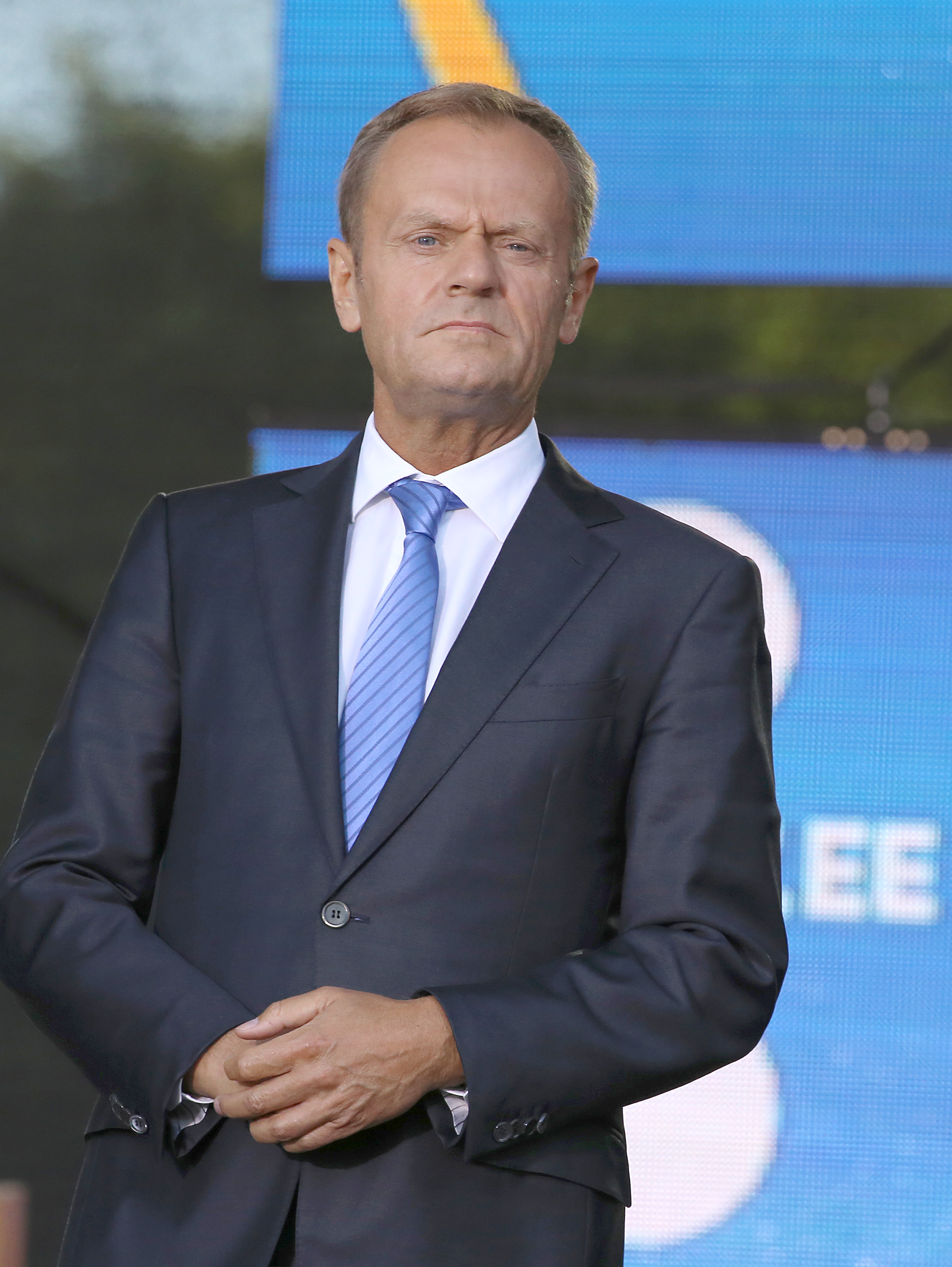 Donald Tusk